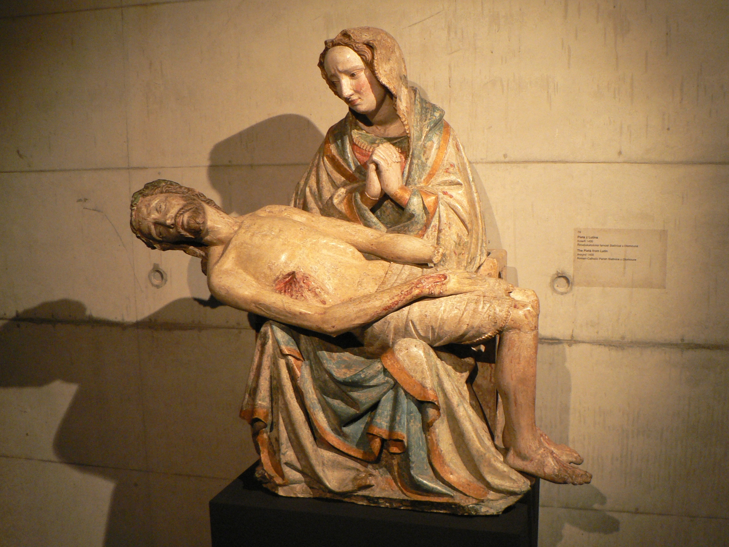 Pieta z Lutína, c. 1400, Archidiecézní muzeum, Olomouc